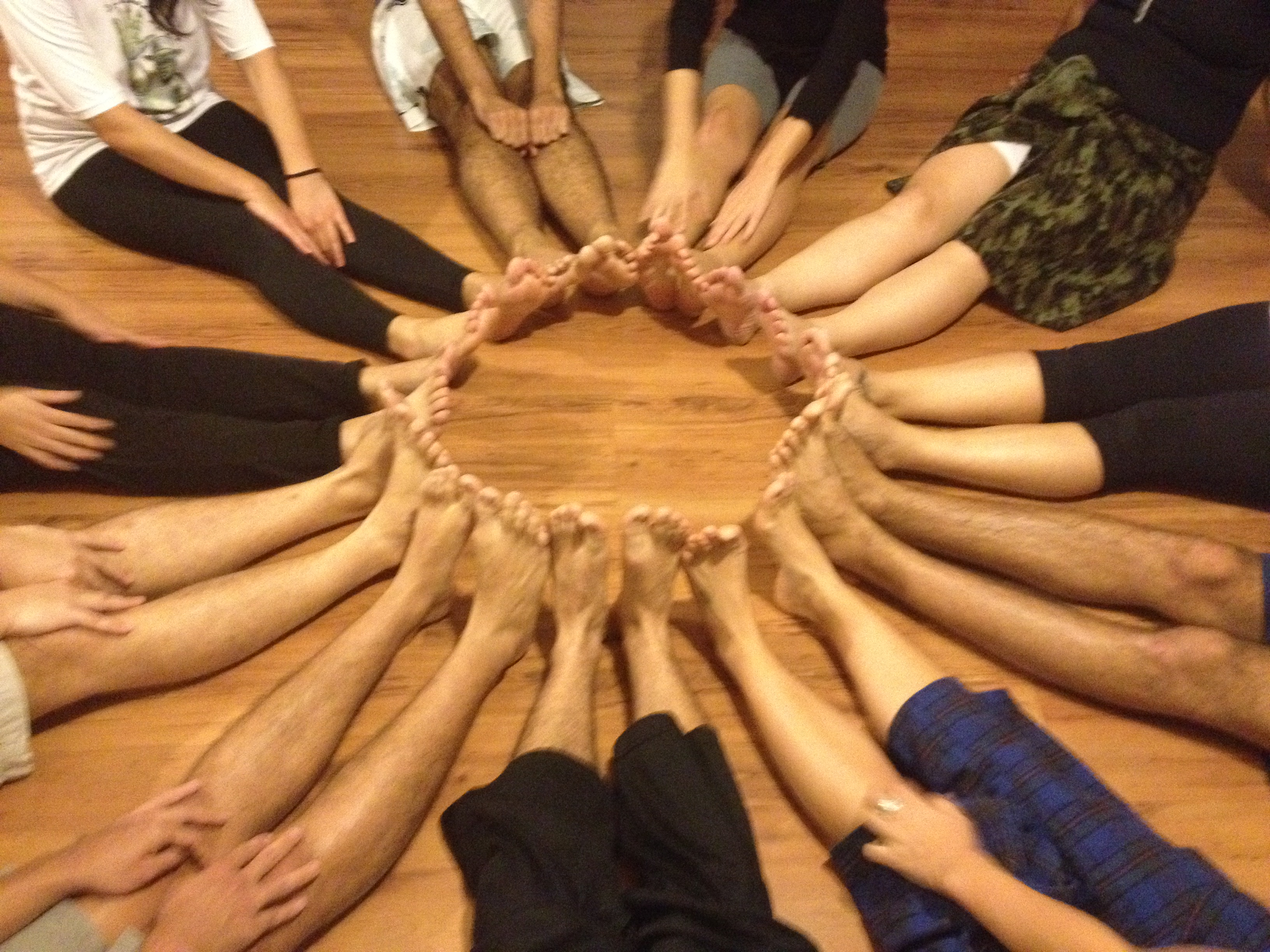 A prática terapêutica da Soma é permeada por exercícios corporais e dinâmicas de grupo autogestionárias.